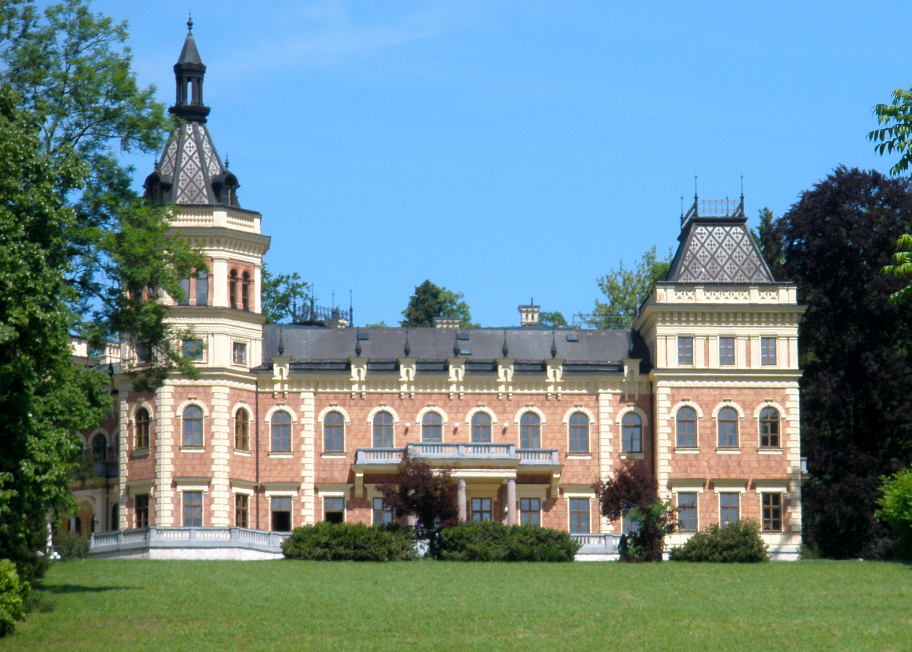 Das Schloss Traunsee in Altmünster bei Gmunden wurde in den Jahren 1872 bis 1875 von Herzog Philipp von Württemberg als Sommervilla ür seine Gemahlin Erzherzogin Maria Theresia erbaut. Erzherzogin Maria Theresia war eine Enkelin Erzherzog Karls des Siegers der Schlacht von Aspern (1809). Das Gebäude erhält daher den Namen "Villa Maria Theresia", ist aber in der Traunseeregion stets als "Schloß Württemberg" bekannt gewesen und hat heute den Namen Schloß Traunsee. Planung und Bauausführung erfolgt durch den Architekten Heinrich Adam (1839 - 1905). Zum Areal des Schlosses gehören ca. 20 ha Grund. Heute ist es im Besitz der Republik Österreich. Das Schloss beherbergt heute ein Internat für Schülerinnen und Schüler des angeschlossenen BRG/BORG Schloss Traunsee.